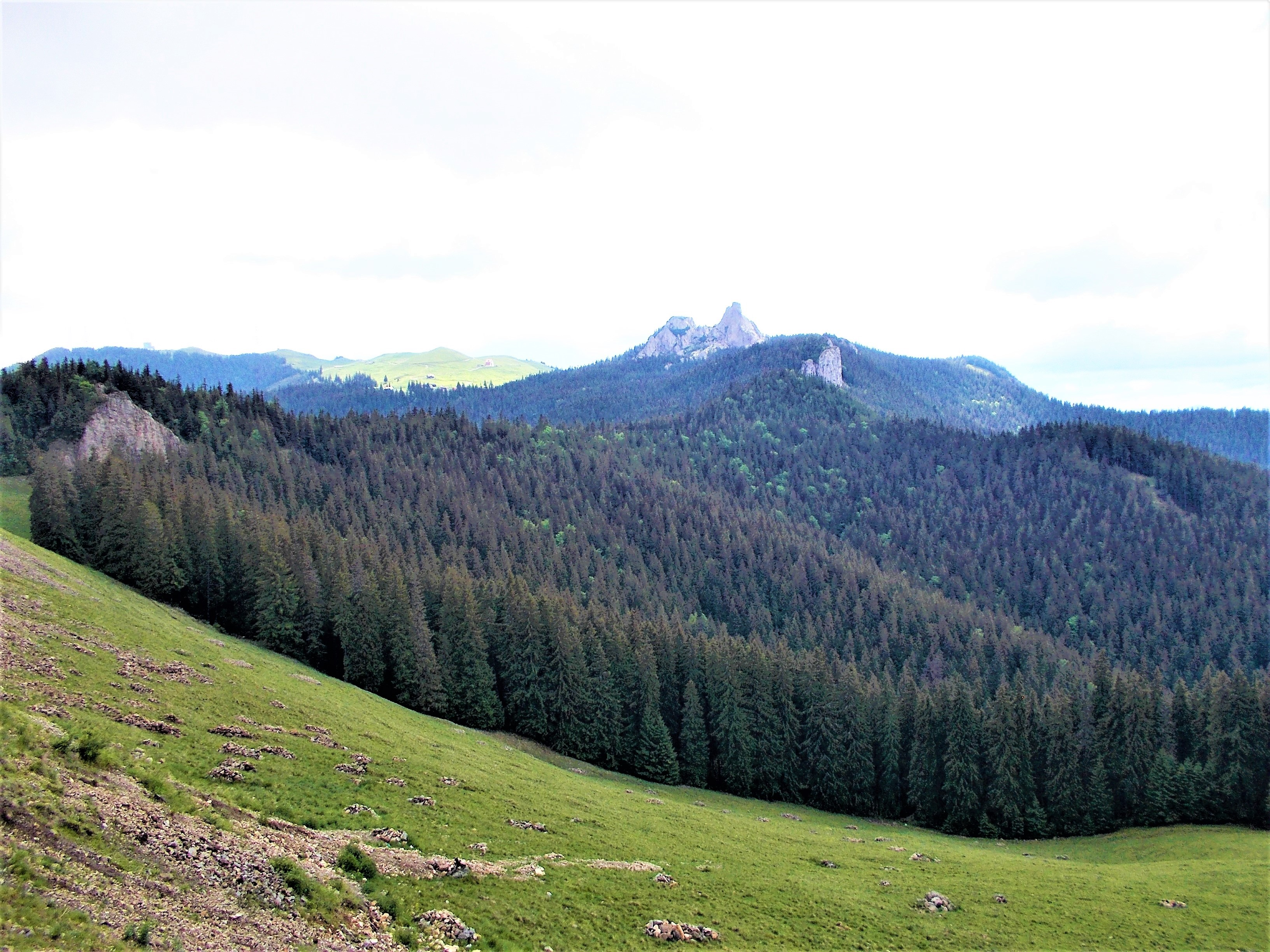 Aria naturală Pietrele Doamnei (253 ha), județul Suceava